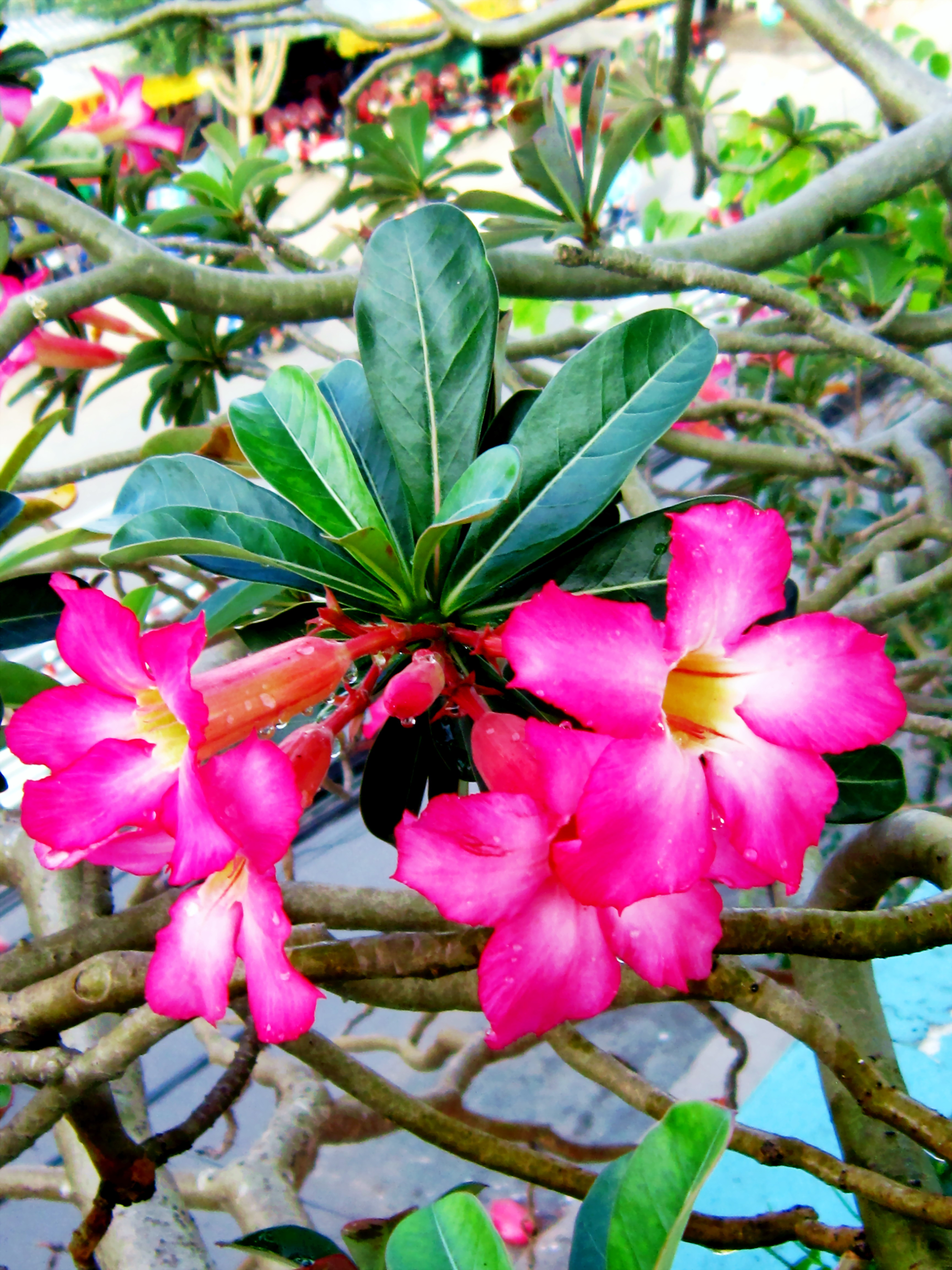 Hoa và lá sứ Thái, còn gọi là sứ sa mạc, có tên khoa học là Adenium Obesum Balt thuộc họ Apocyanacae (Trúc đào).